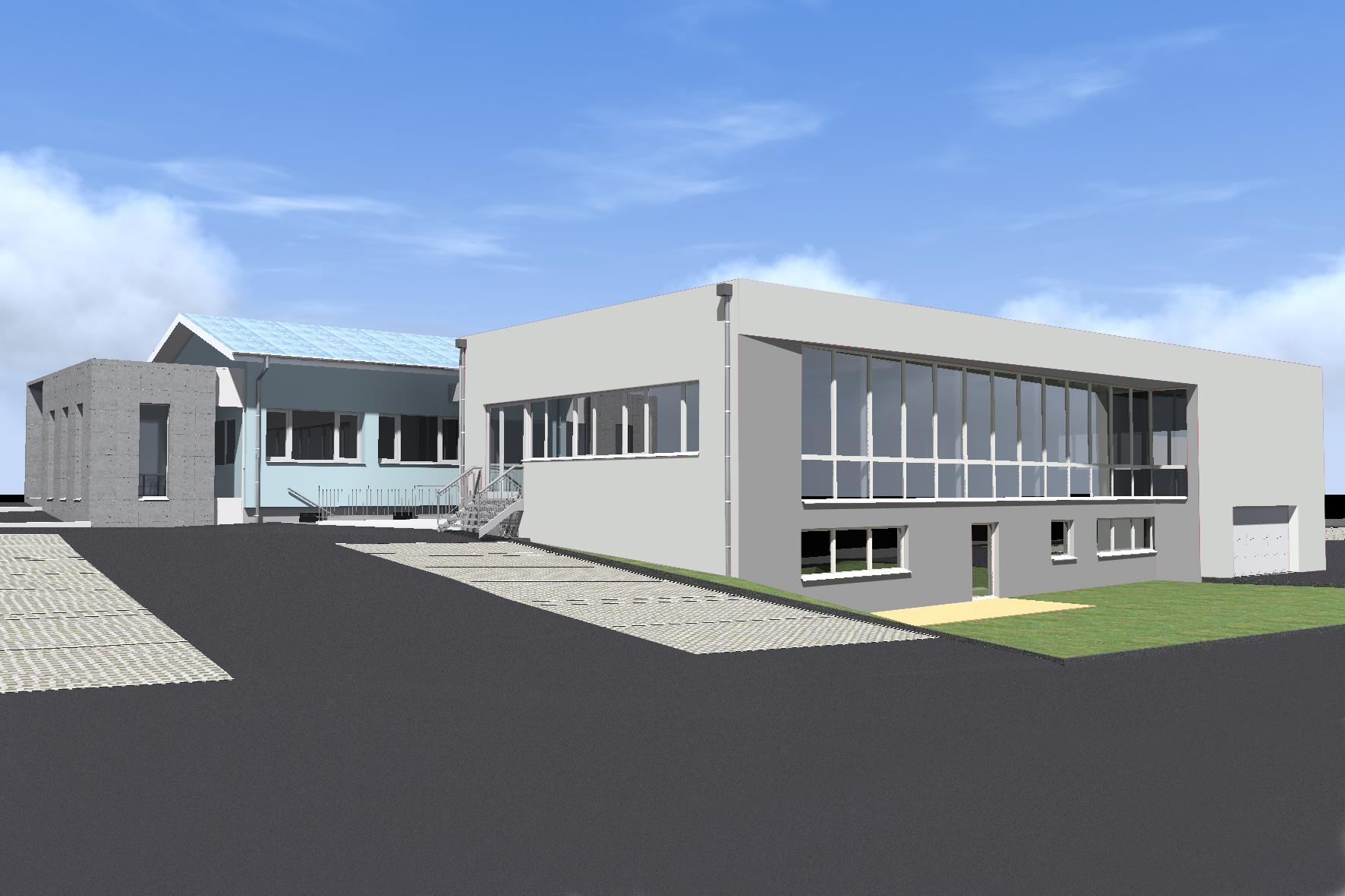 Image de la nouvelle usine suite à l'agrandissement 2014